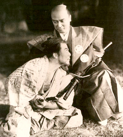 Passage du film Les 47 Ronin, de Kenji Mizoguchi